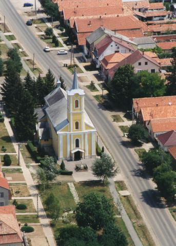 Kartal, Hungary, aerialphotography. Szent Erzsébet római katolikus templom